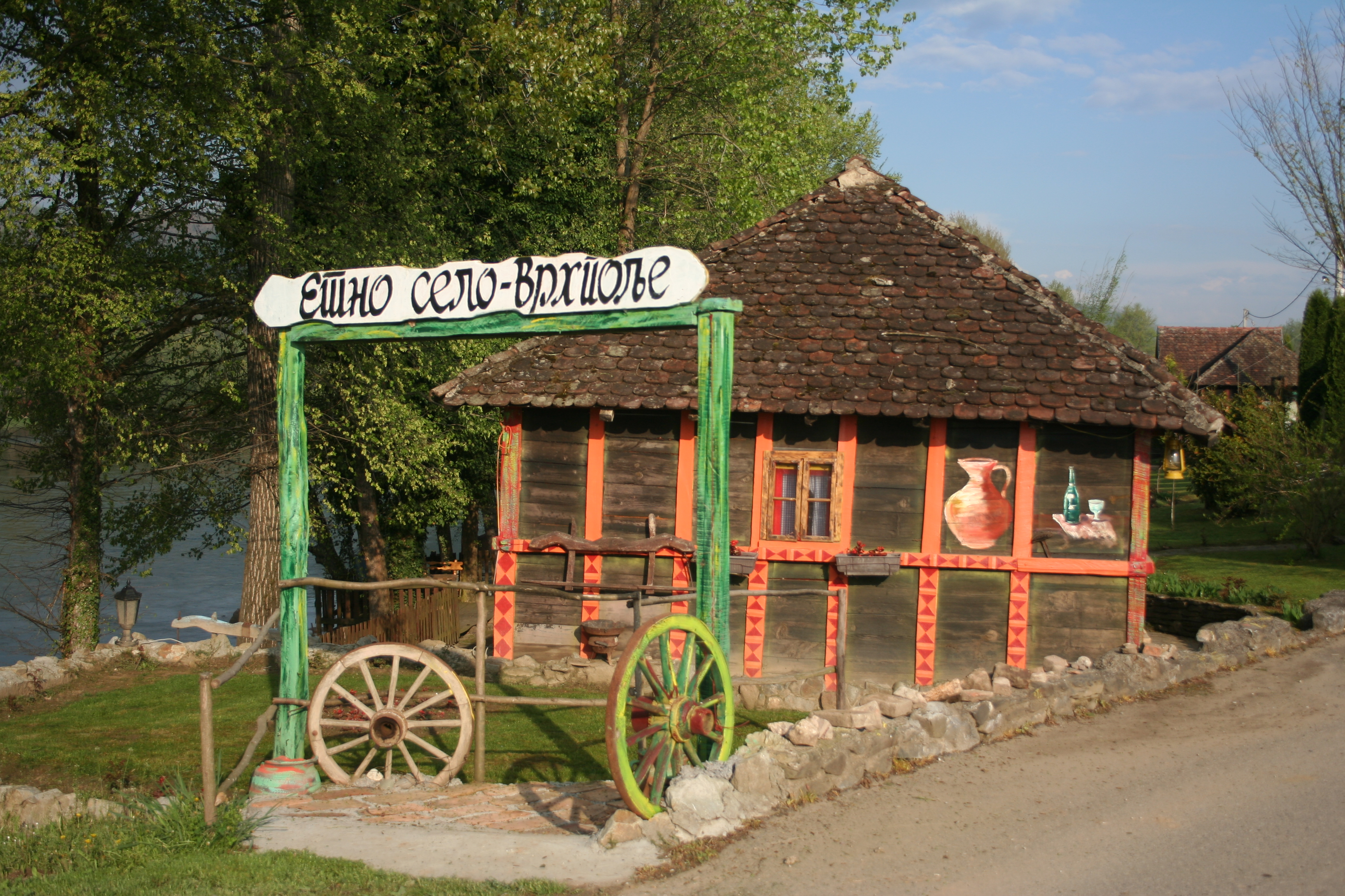 Etno selo Vrhpolje